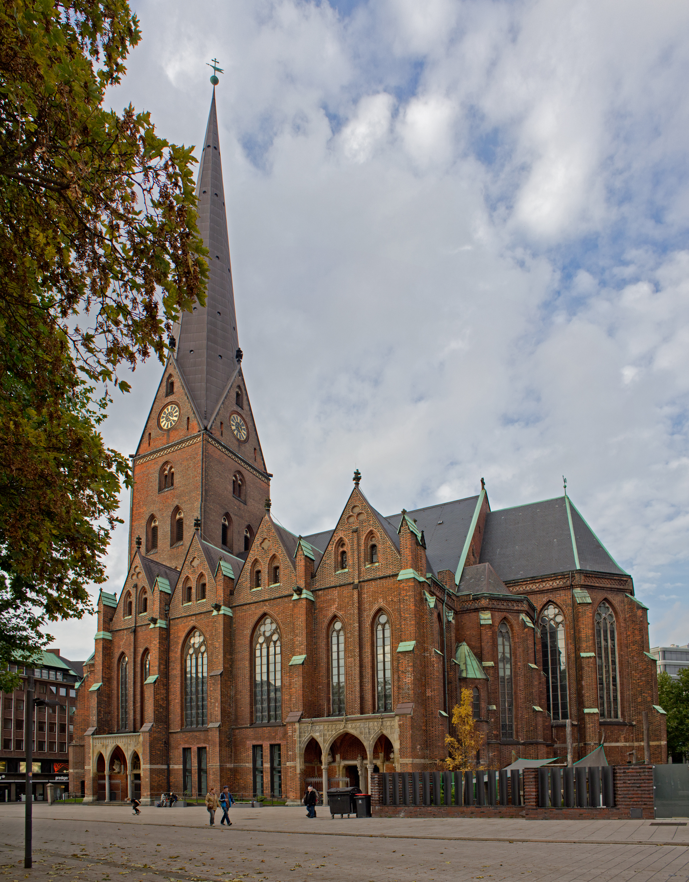 Hamburg, Hauptkirche St. Petri.This is a photograph of an architectural monument.